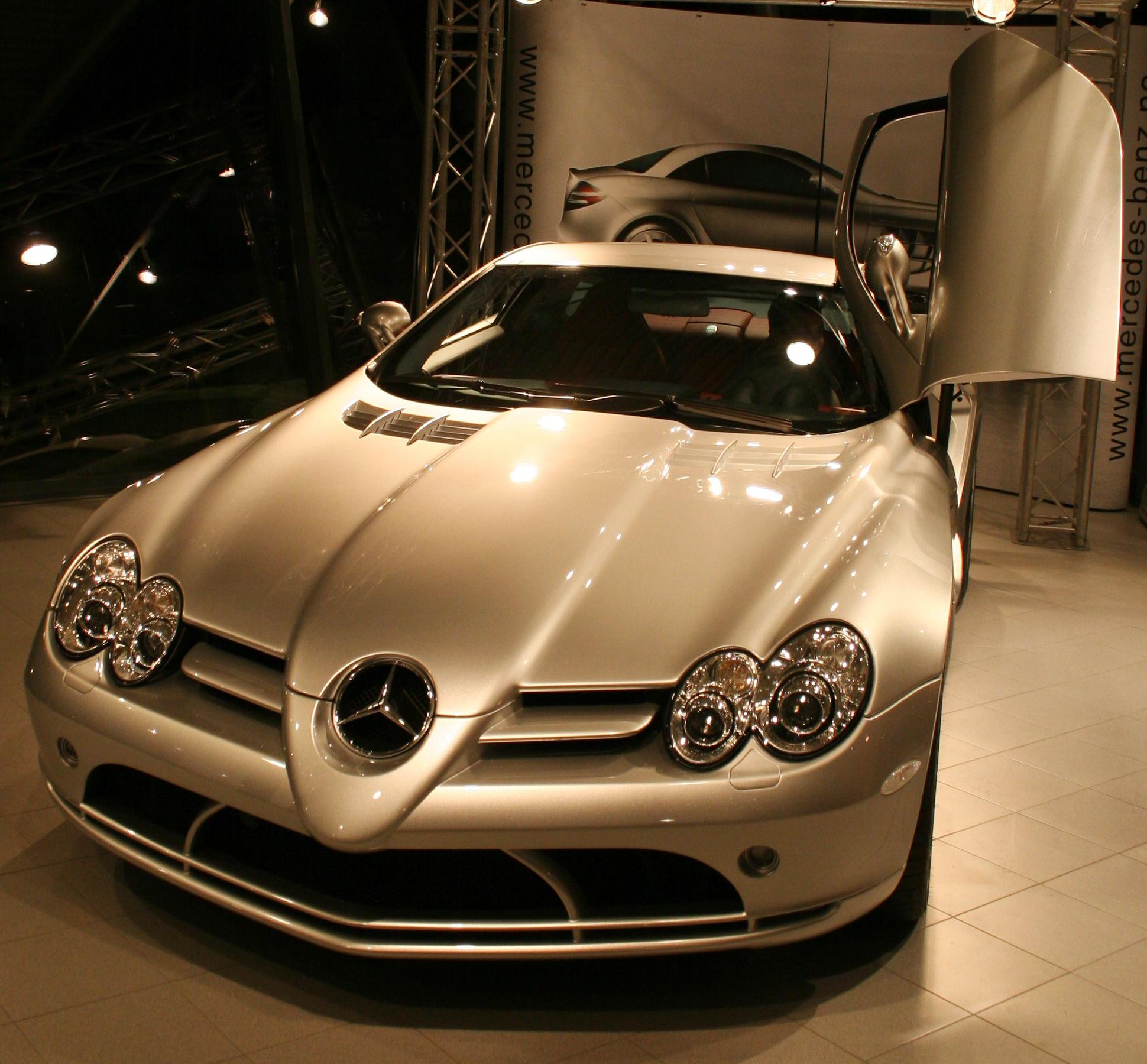 Mercedes-Benz SLR McLaren (Norway 2005)